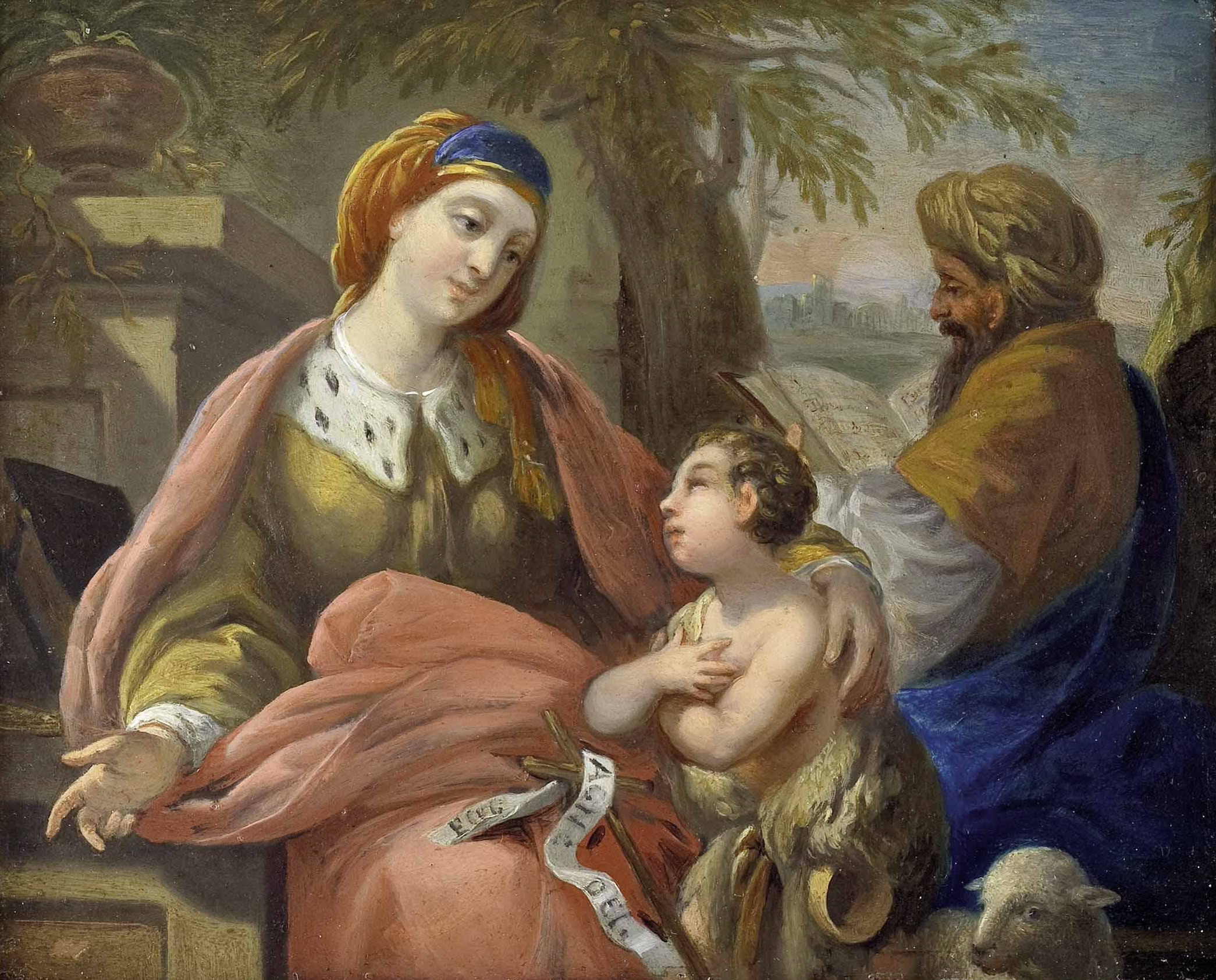 "Die Hl. Elisabeth mit dem Johannesknaben (Ecce Agnus Dei) und dem lesenden Hl. Zacharias in Landschaft"